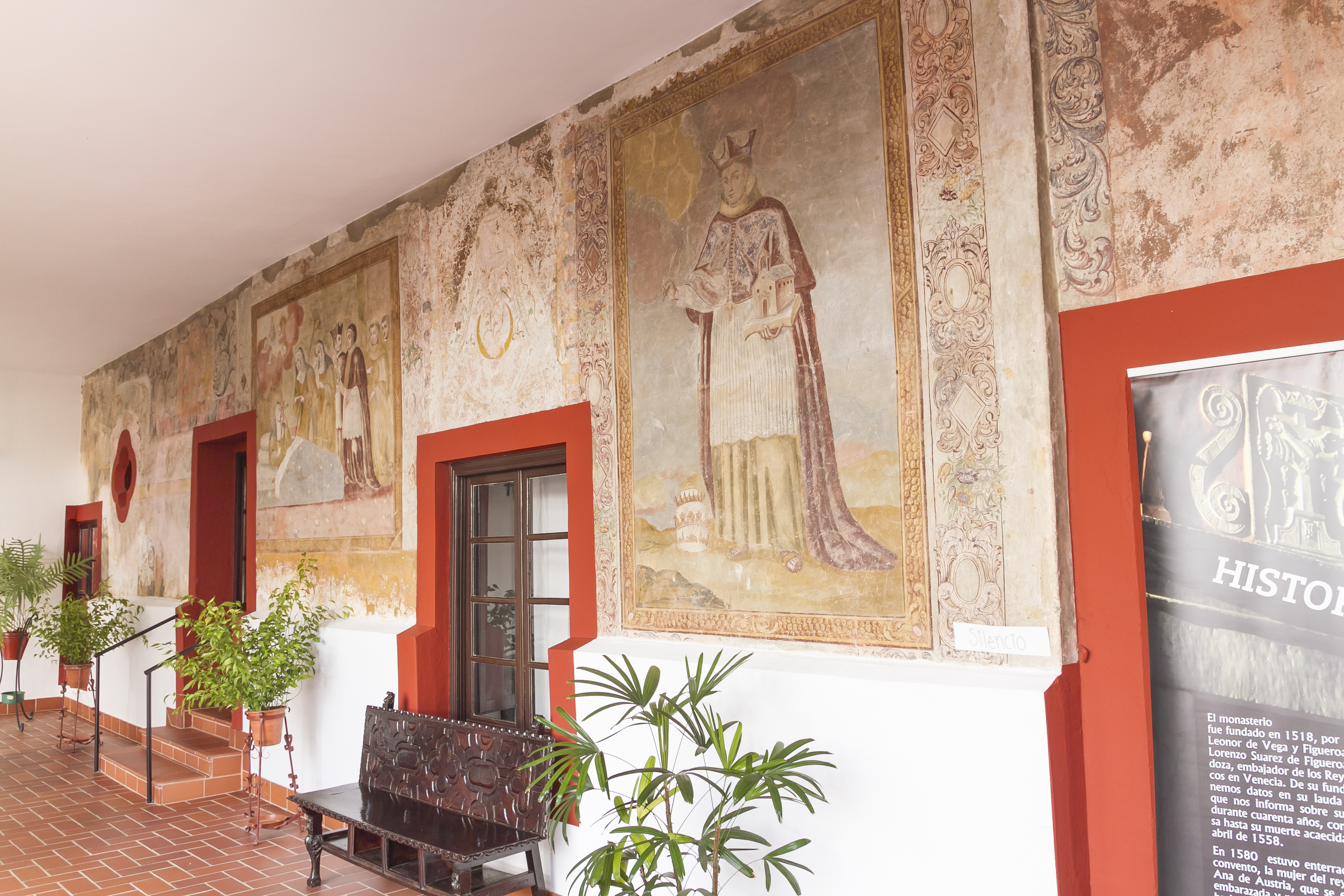 Pinturas murales del claustro del Real Monasterio de Santa Ana de Badajoz.